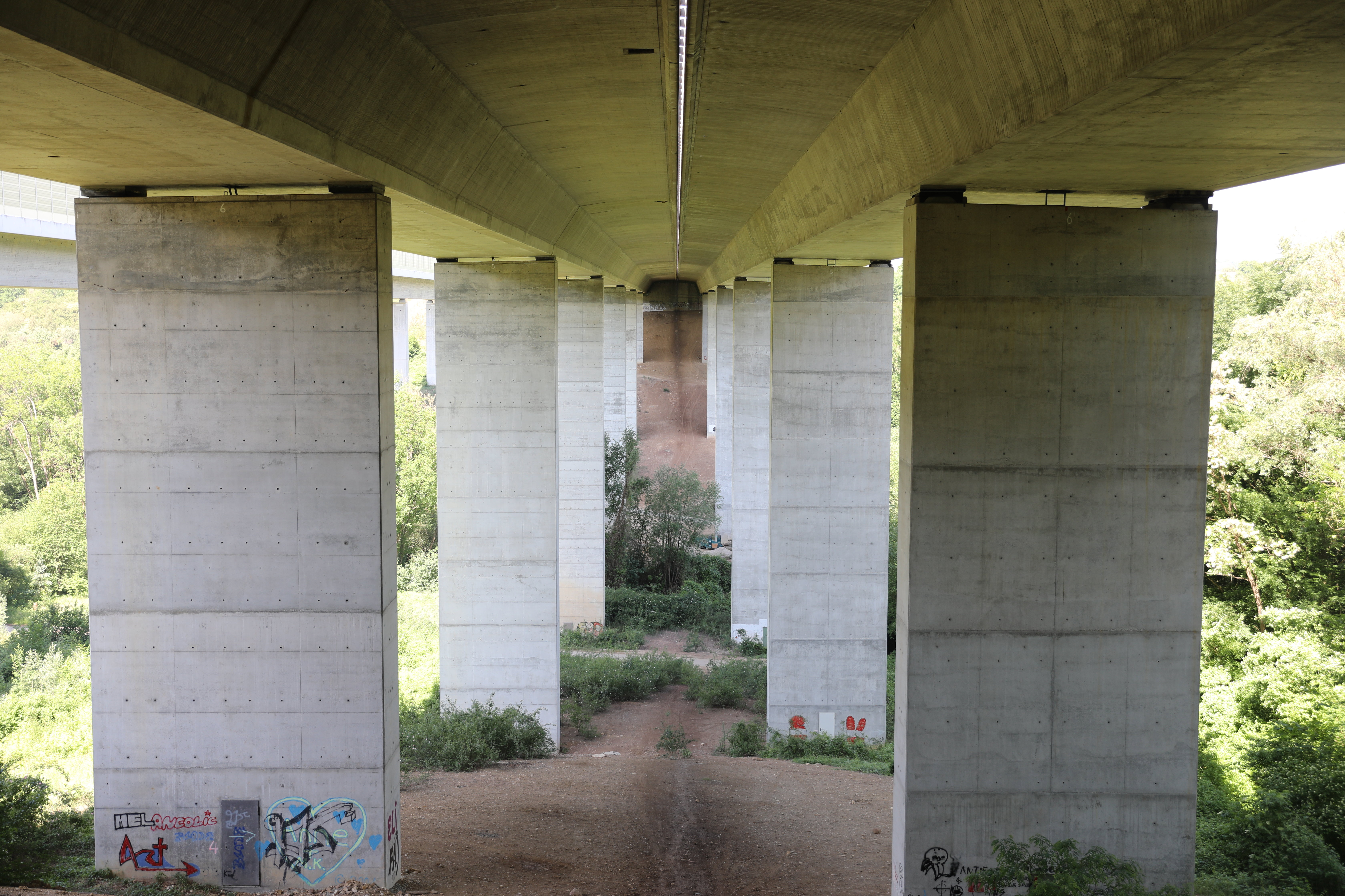 Sulzbachtalbrücke bei Denkendorf, Untersicht Richtung Westen